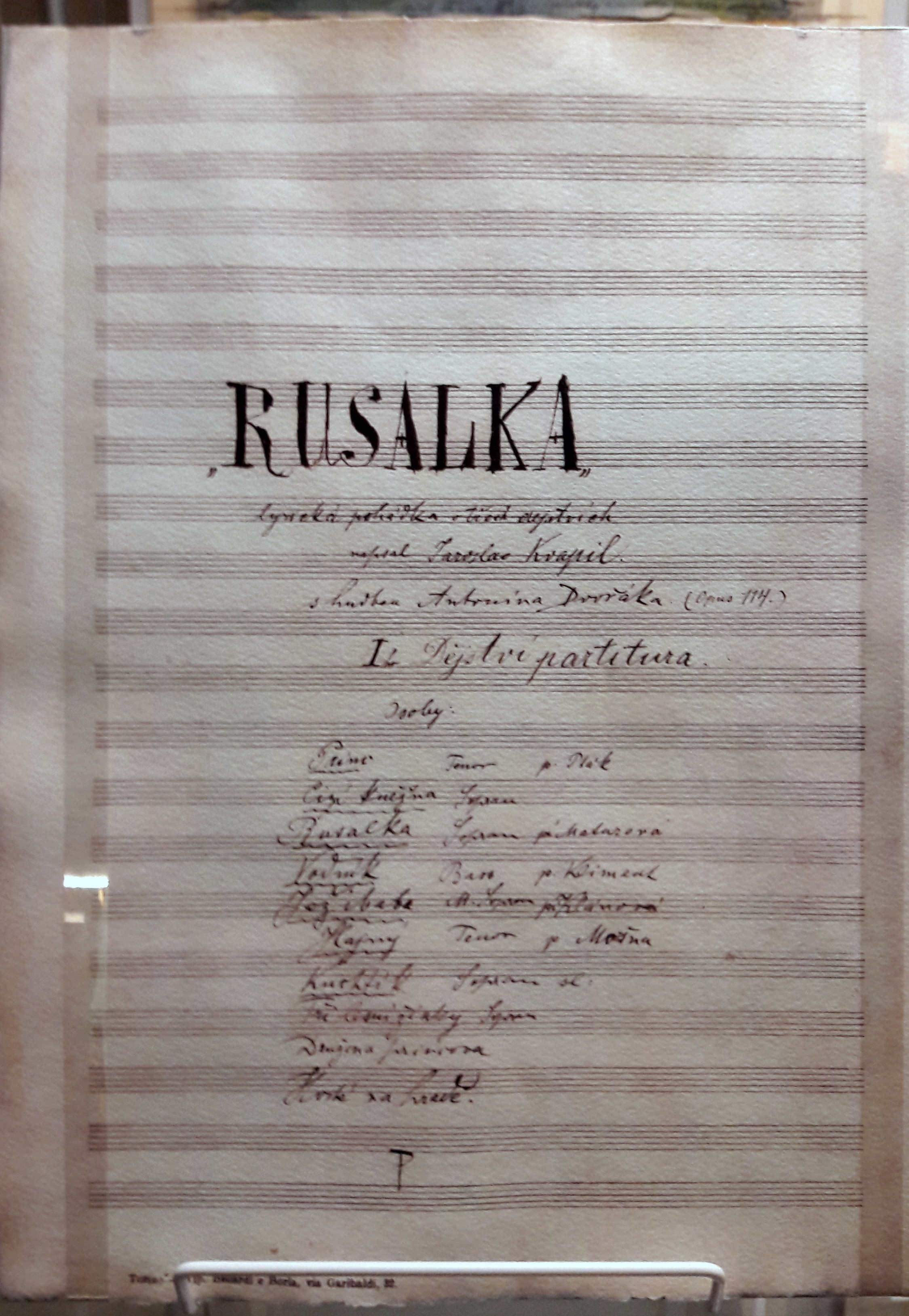 Rusalka, titulní strana autografu Antonína Dvořáka, Praha 1900, České muzeum hudby